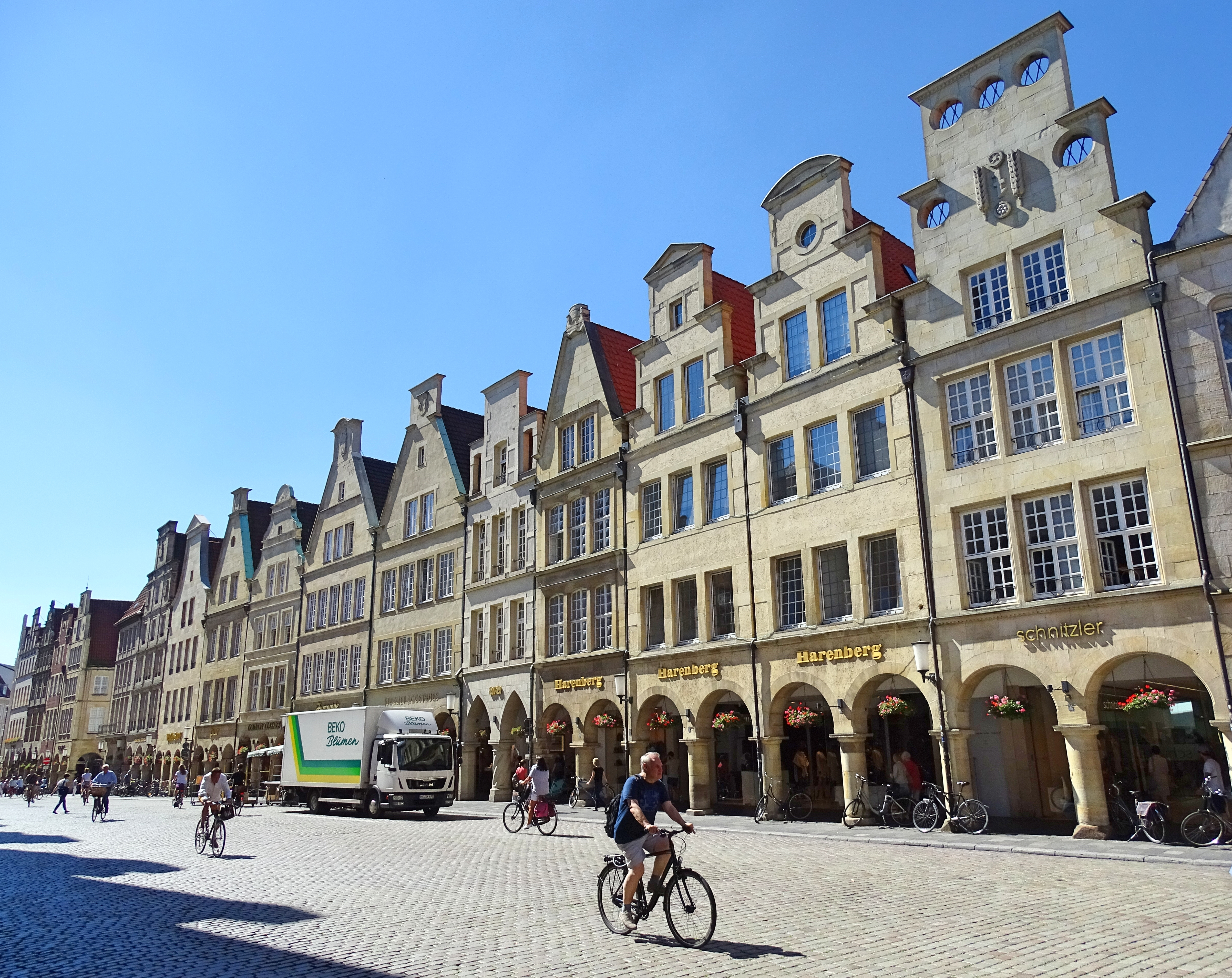 Münster, Germany